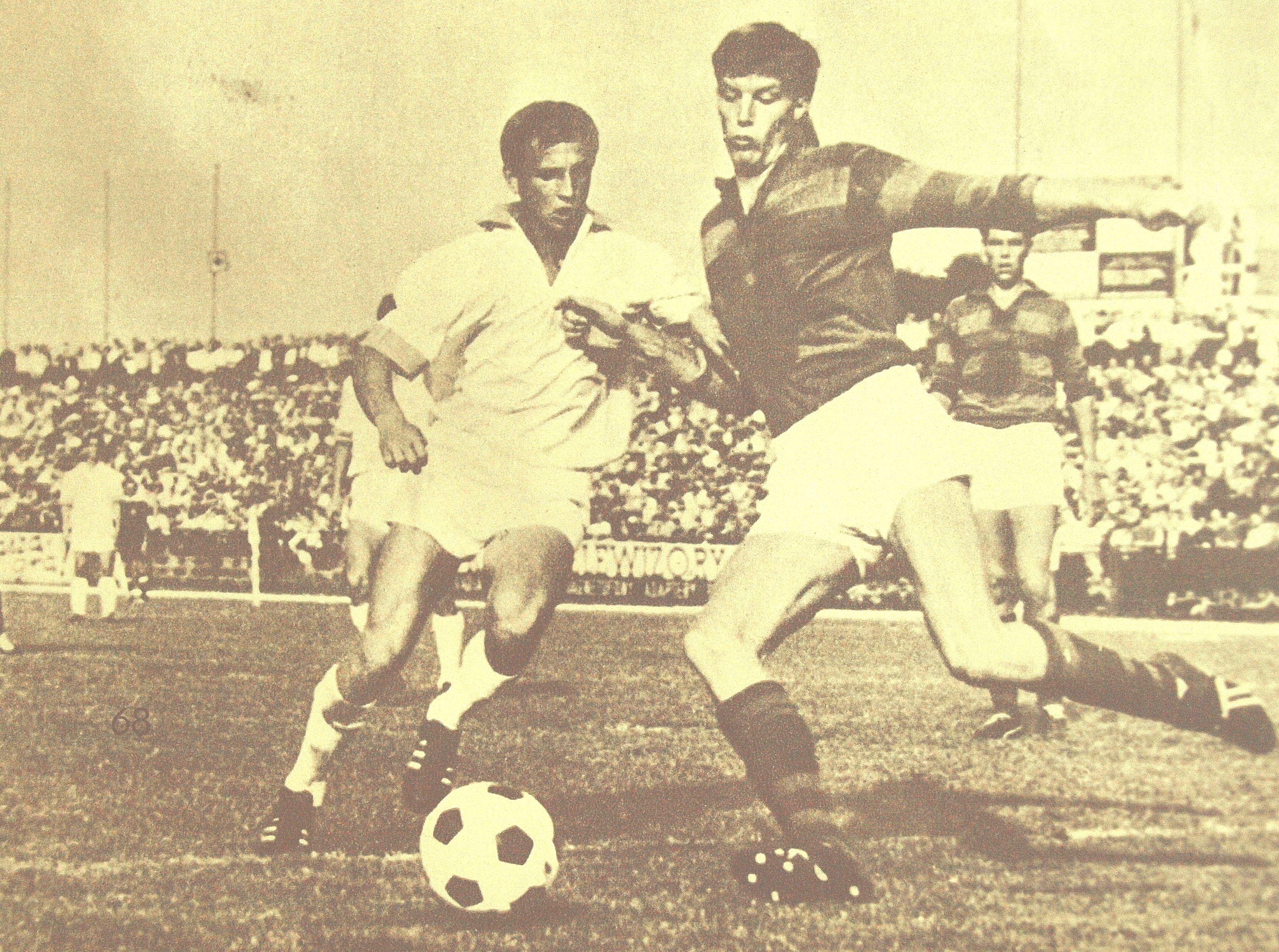 Mecz Ruch Chorzów - Frem Kopenhaga